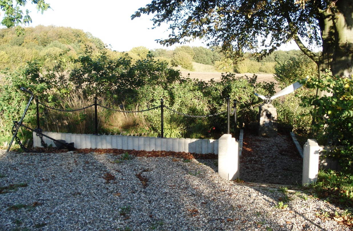 Gedenkstaette Vossberg